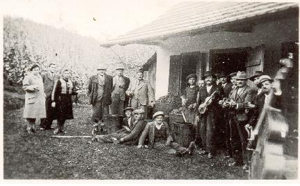 Viničarija Viktorja Voglerja v prvi polovici 20. stoletja v Vadarcih